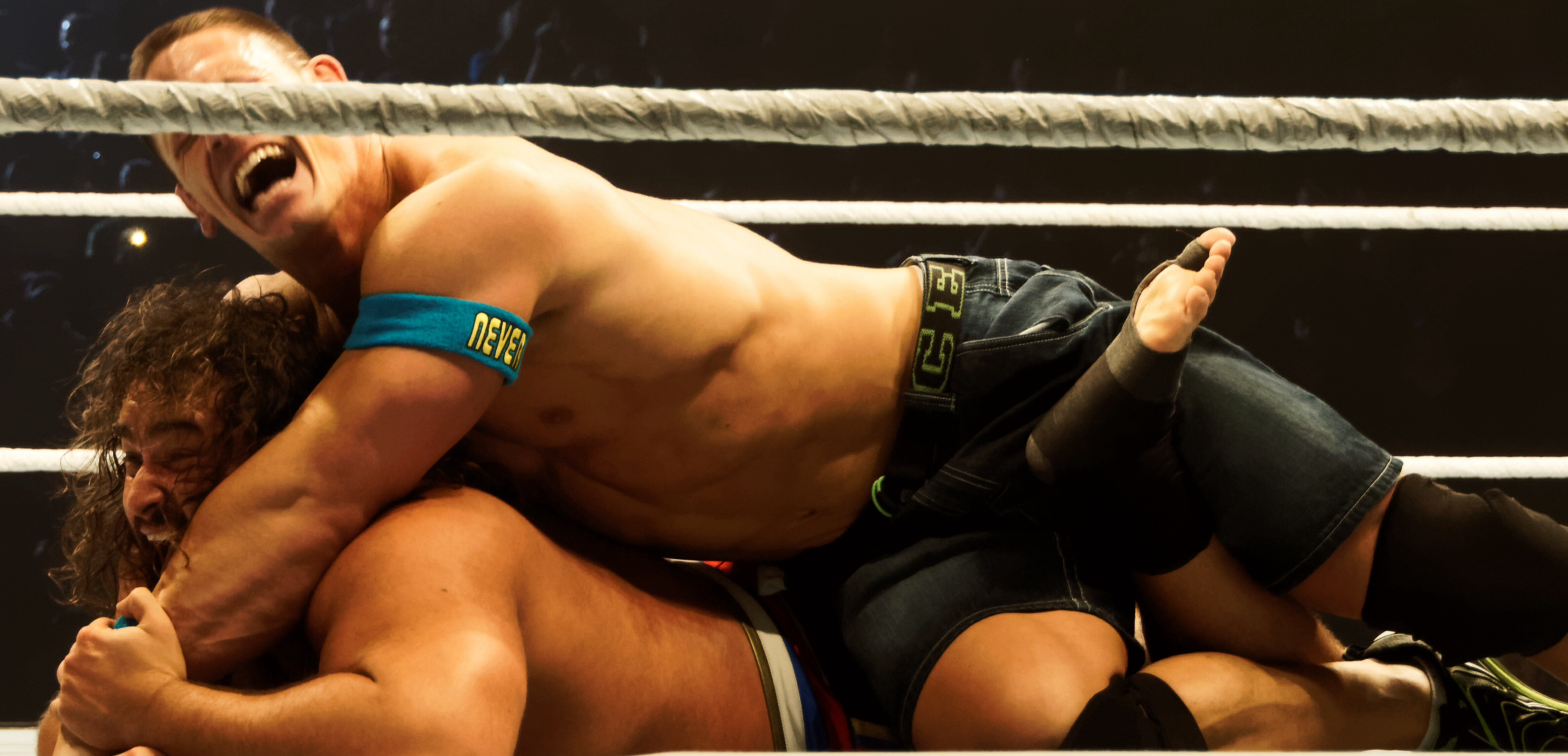 WWE Live@Lotto Arena - Antwerpen